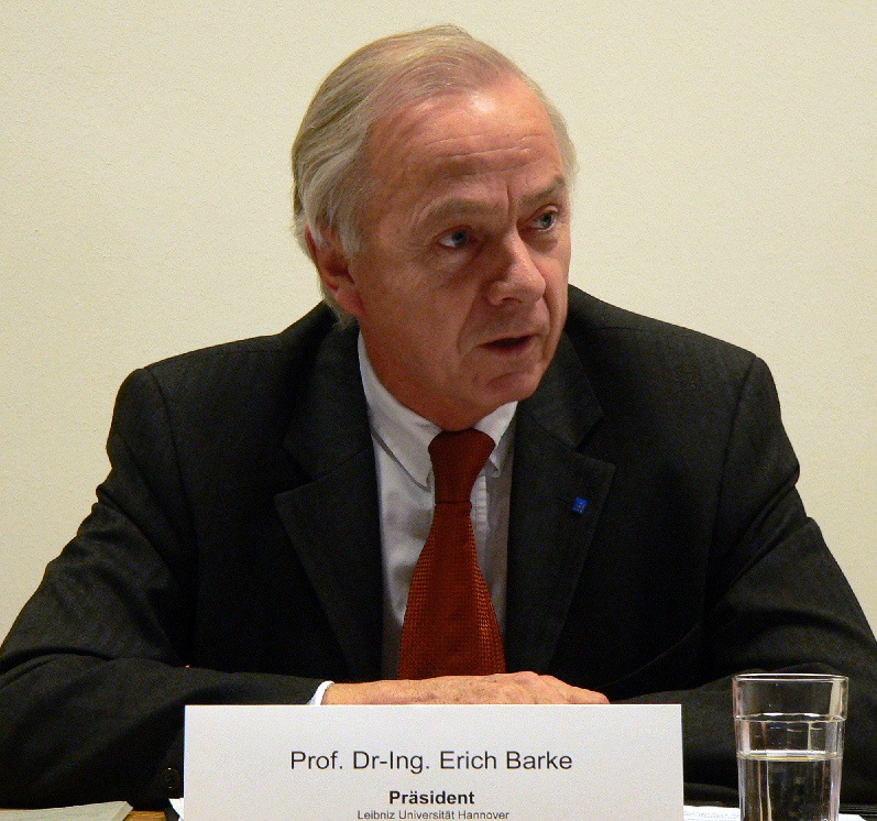 Erich Barke